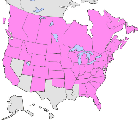 Распространение сурепки обыкновенной Barbarea vulgaris в штатах Канады и США